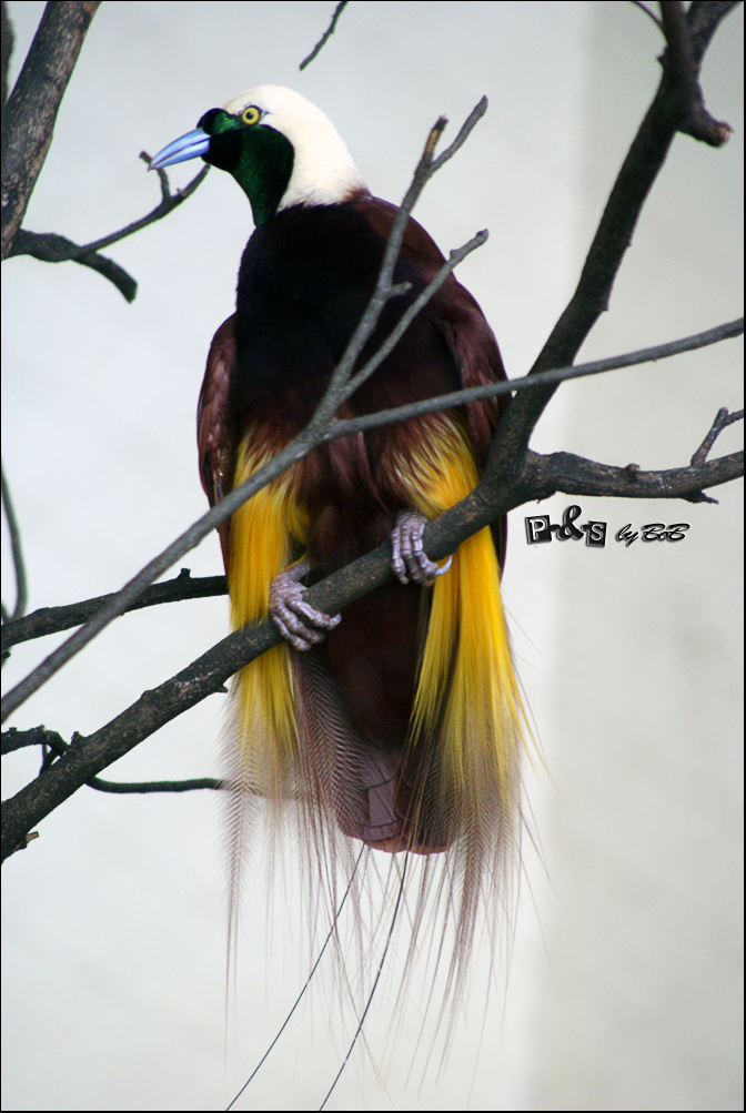 Cenderawasih Kuning Besar (in Malay) at KL Bird Park, Malaysia See